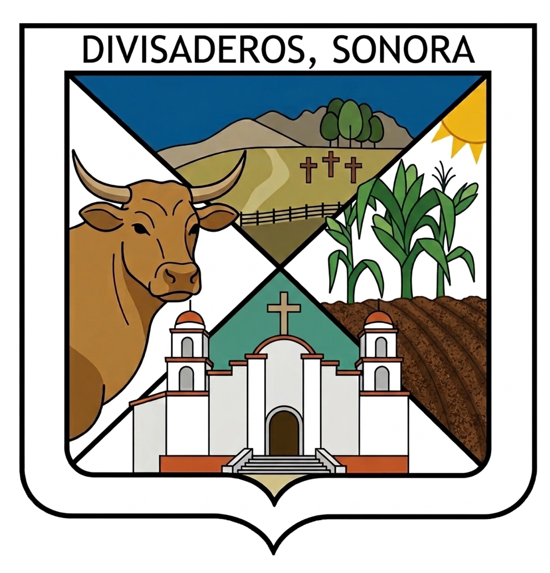 Escudo de armas del municipio de Divisaderos, Sonora